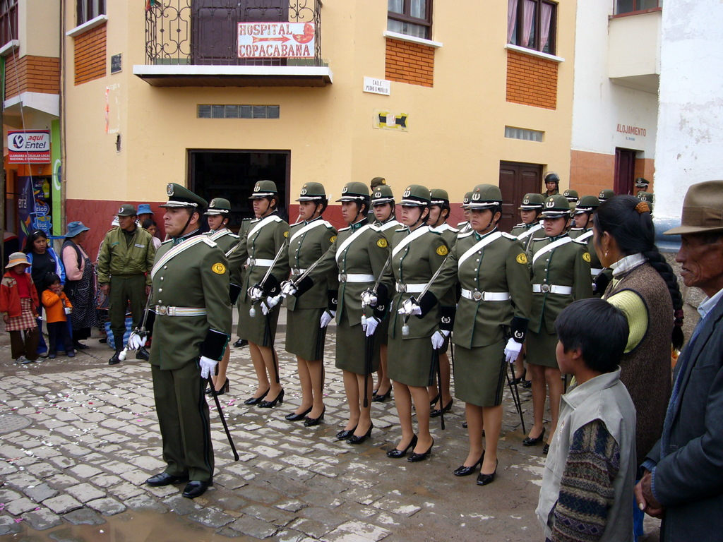 Military parade in Copacabana, Bolivia